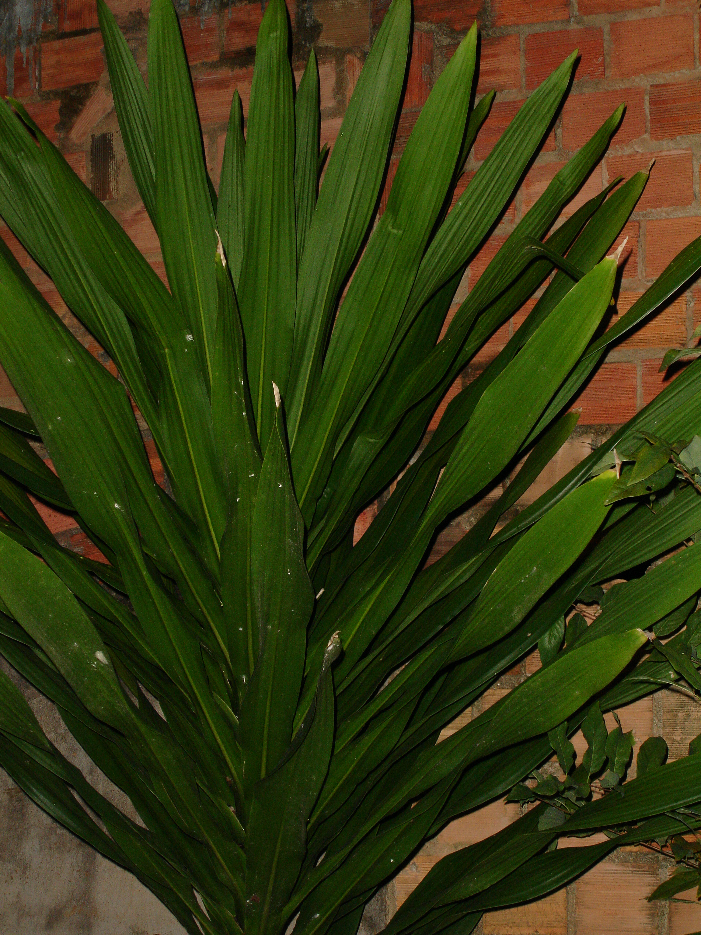 Dracaena. Peregun ou Nativo Orossi